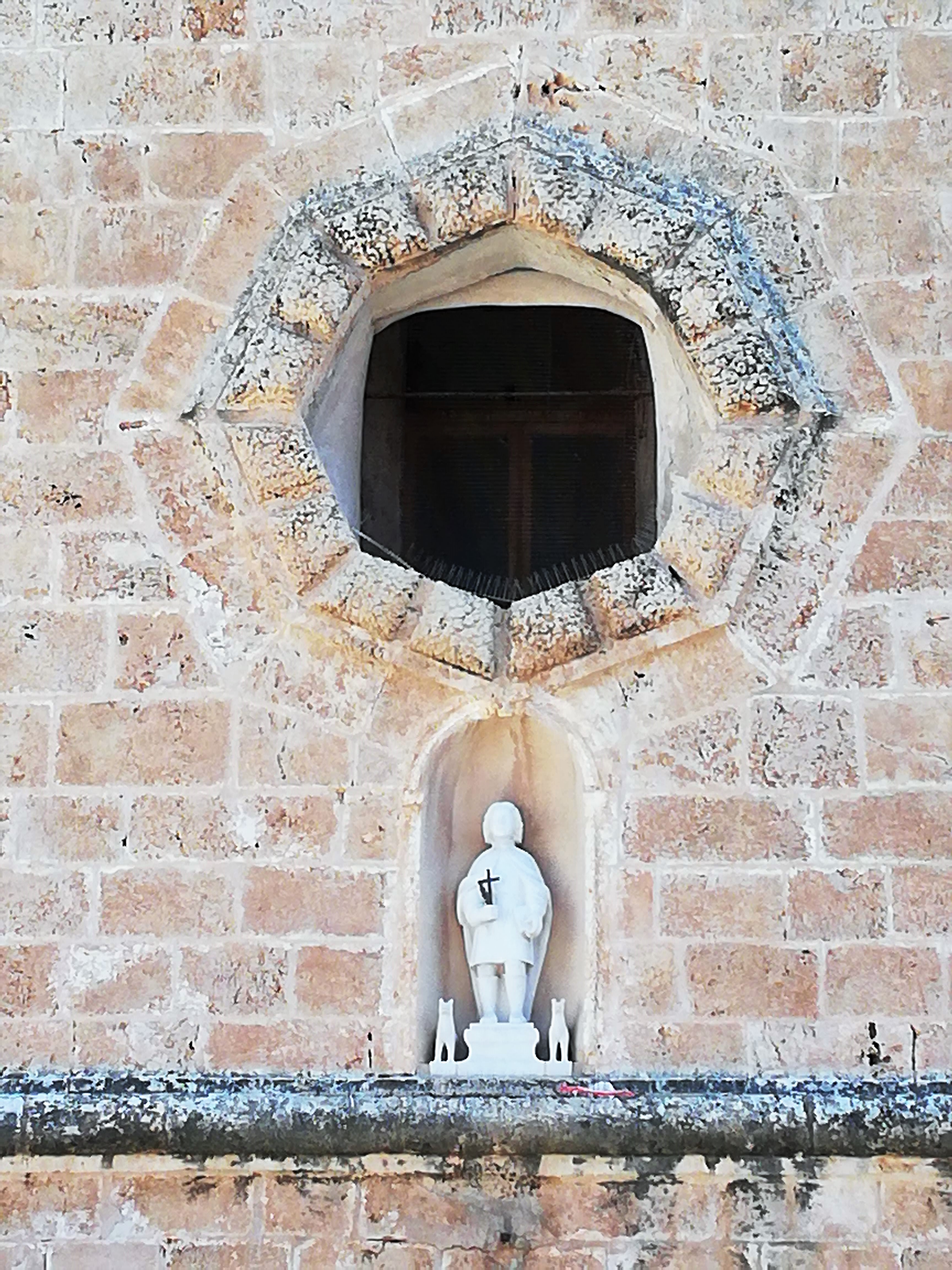 Oculo ottagonale, statuetta marmorea della facciata.